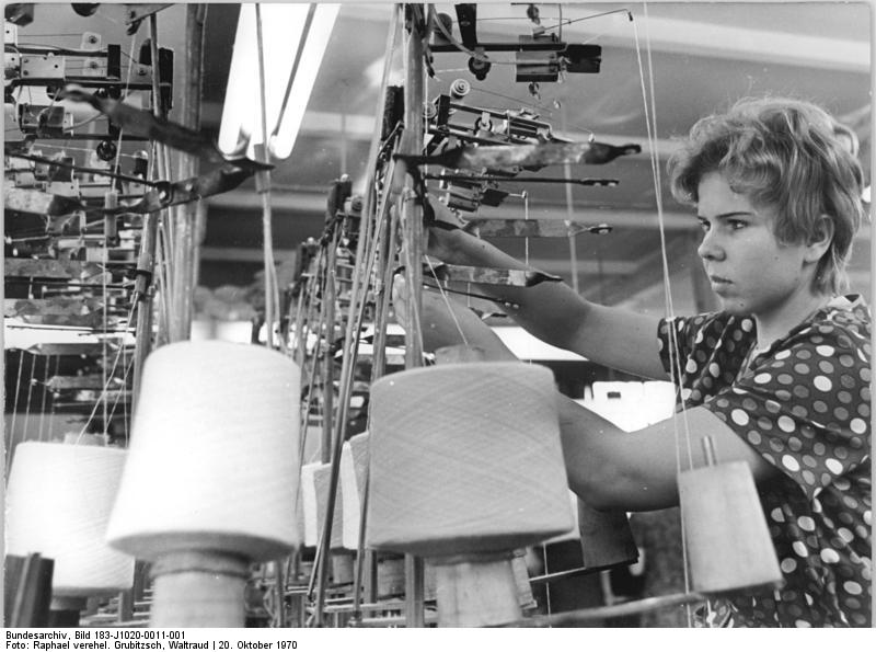 Zentralbild-Raphael-20.10.1970-ku-Bez. Leipzig: Bester Lehrling im VEB Erstlings- und Kinderoberbekleidungswerk Oschatz ist Petra Kürsten. Sie konnte im letzten Berufswettbewerb die Silbermedaille erringen. Petra Kürsten gehört zu der Strickereibrigade, deren Neuerervorschläge zur Erweiterung der Strickkapazität und damit zur besseren Versorgung der Bevölkerung mit Kinderoberbekleidung führten. Die Werktätigen dieses Betriebes nutzen in drei Schichten die hochproduktiven Anlagen. Bis zum 30.9. hatten sie den Jahresplan anteilmäßig mit 75,3 Prozent erfüllt.